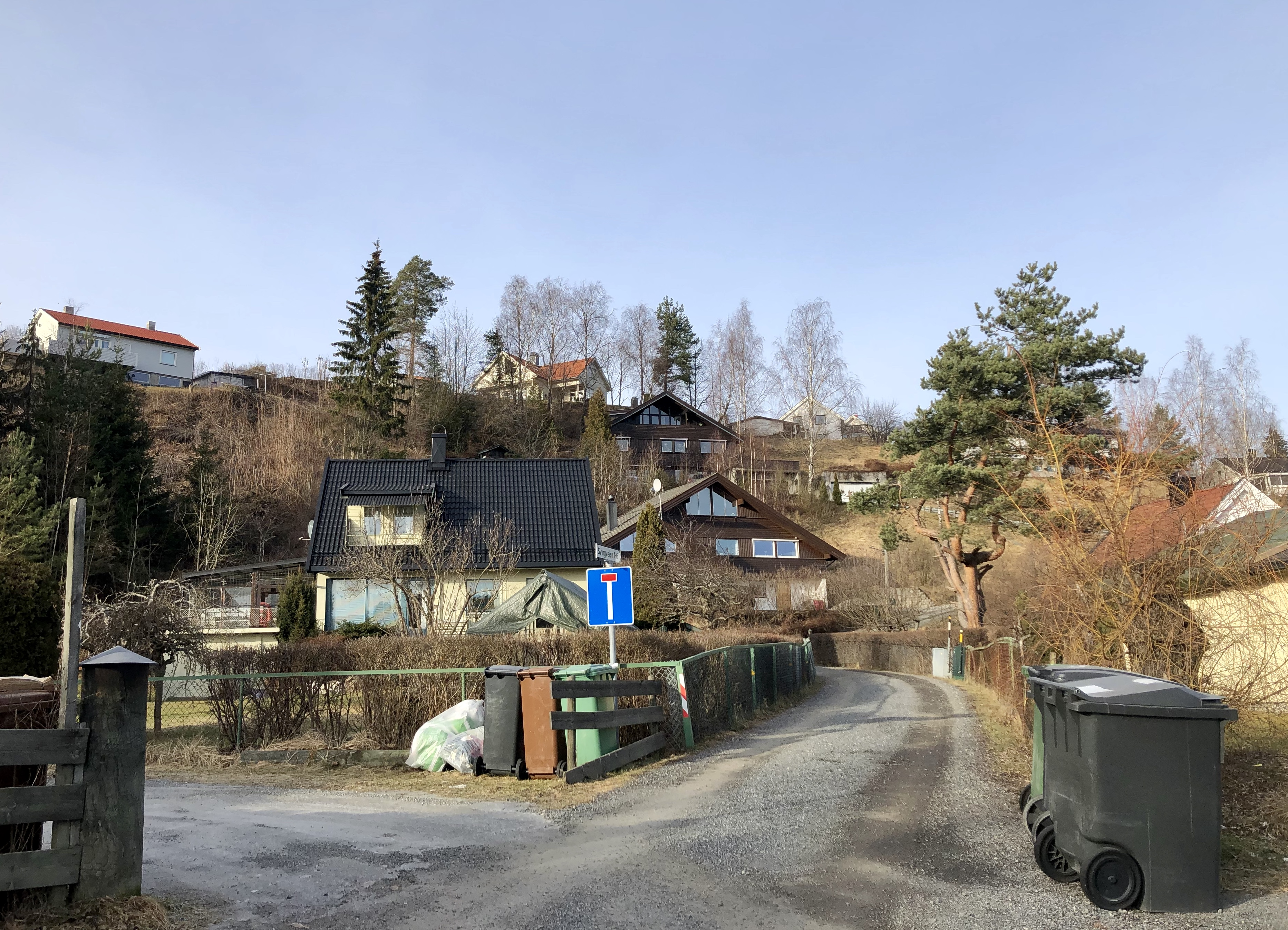 Svingveien (1A og 1B), Hønefoss